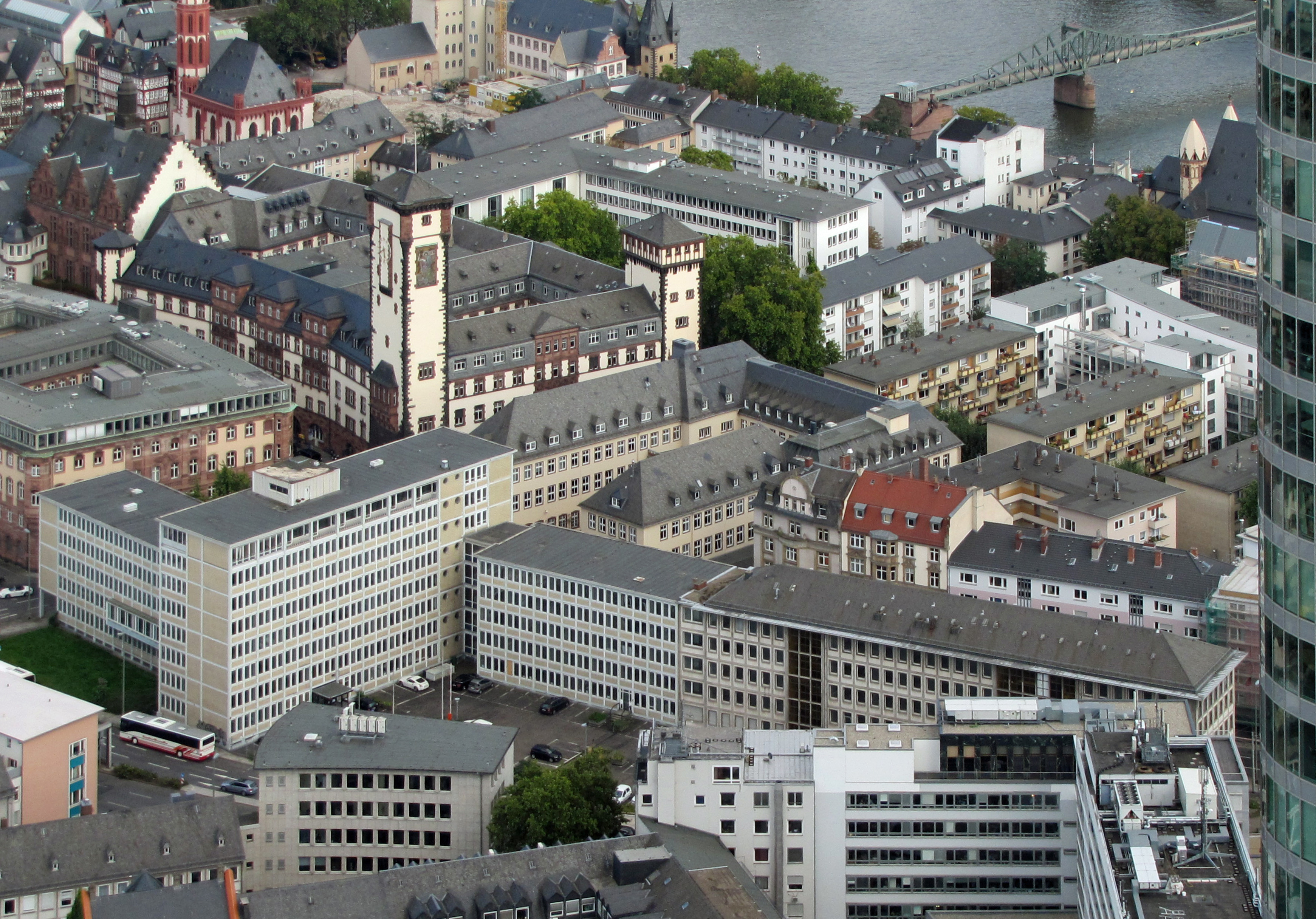 Der ehemalige Bundesrechnungshof-Komplex, zwischen Berliner und Braubachstrasse in Ffm